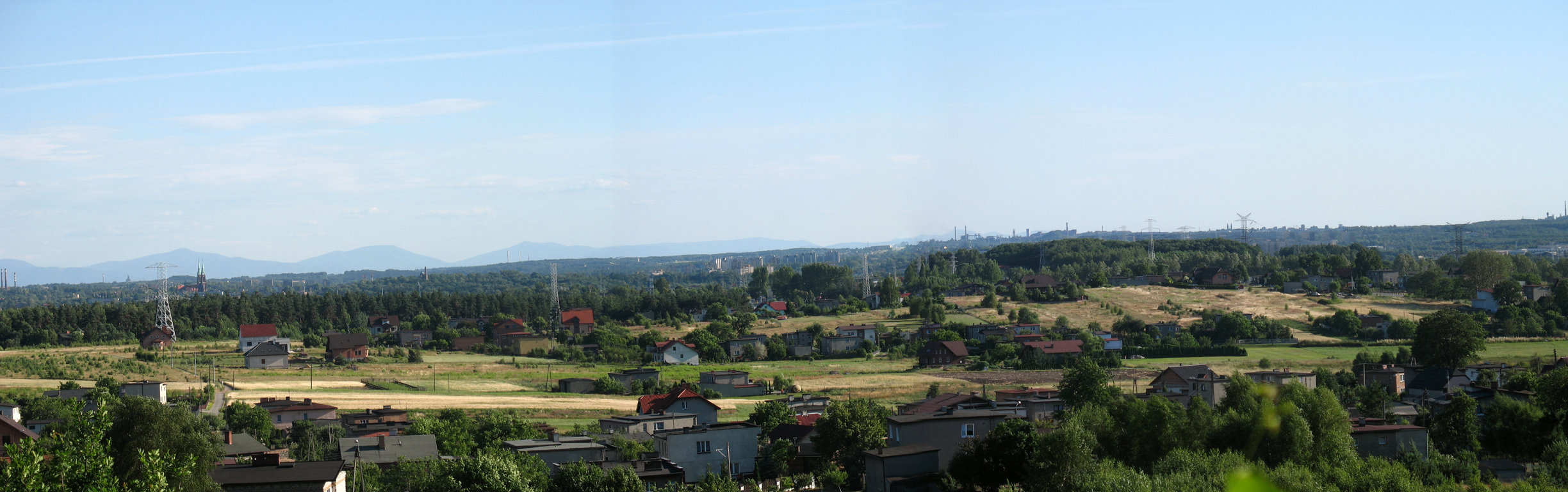 Panorama Rybnika i okolic z góry Grzybówka